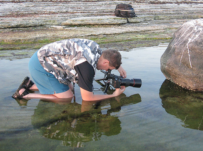 Eesti bioloog ja loodusfotograaf Urmas Tartes.